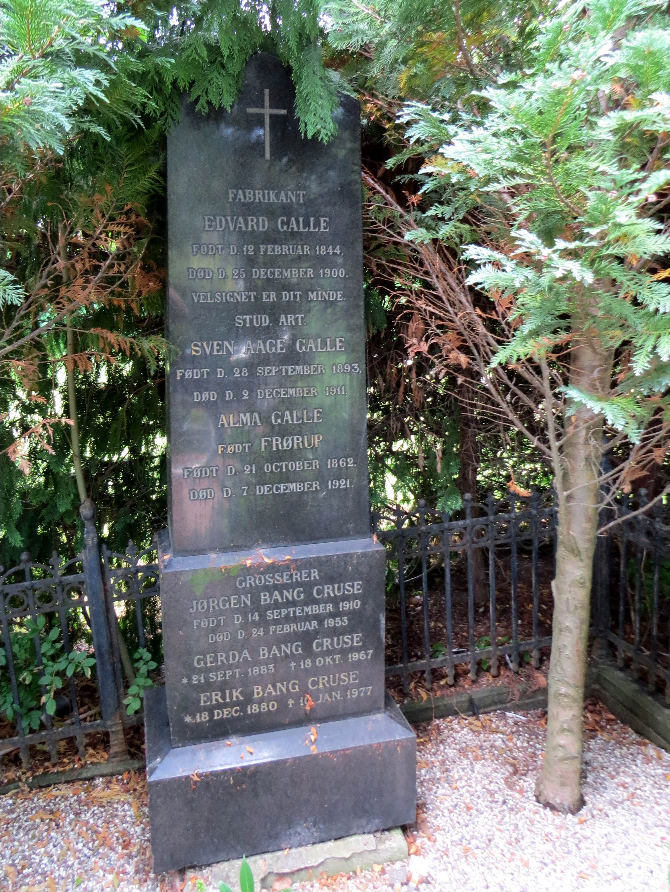 Edvard Galle (1844-1900) med families gravminde, Holmens Kirkegård, København